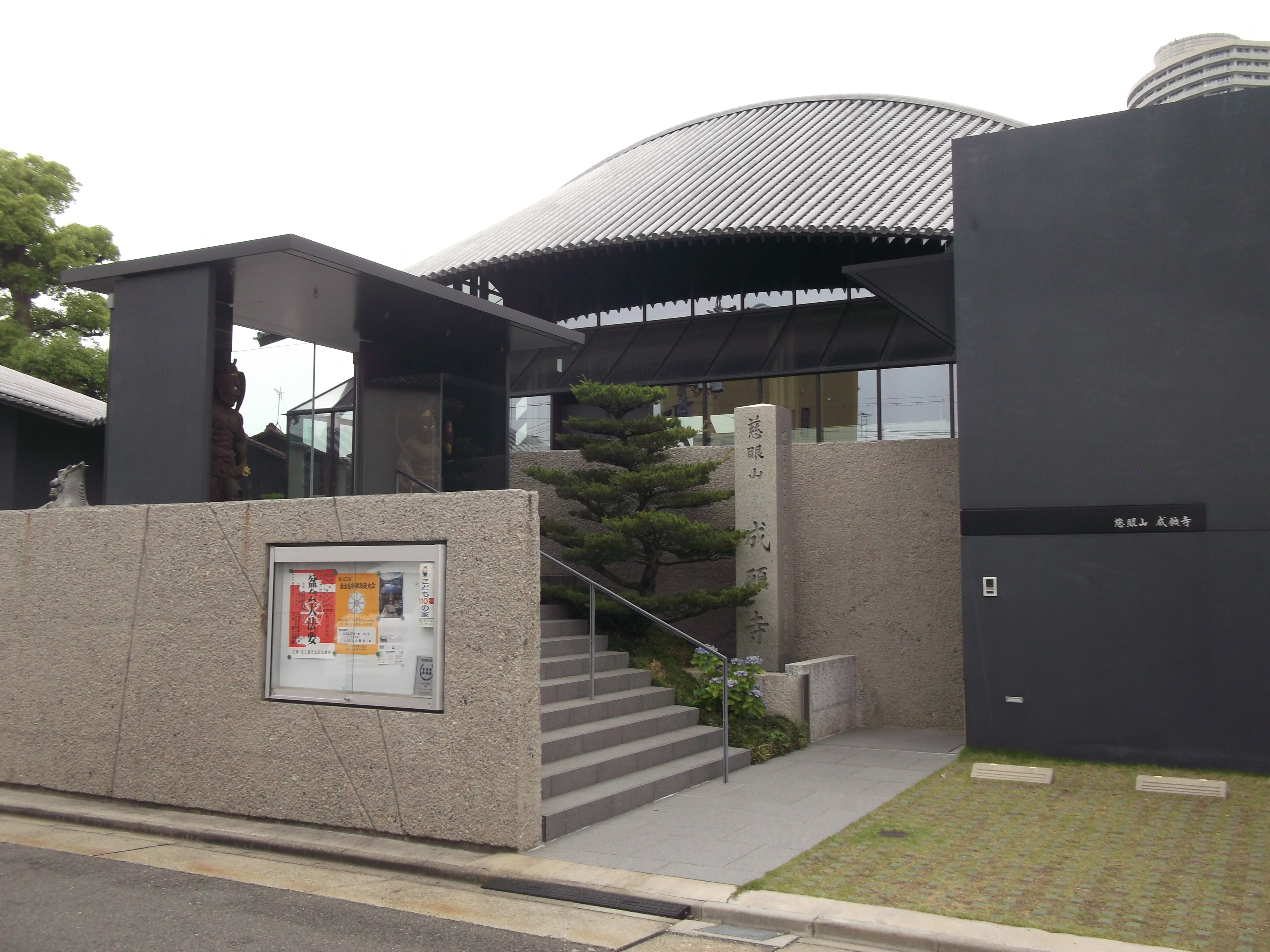 名古屋市北区成願寺にある寺院